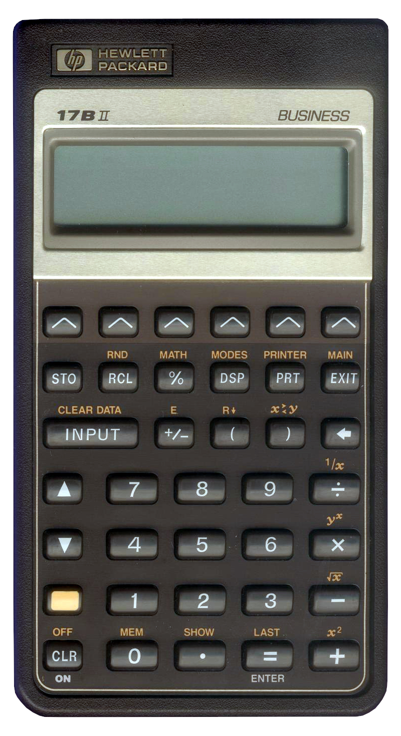 HP 17BII - Zdjęcie wykonano poprzez zeskanowanie kalkulatora skanerem płaskim.